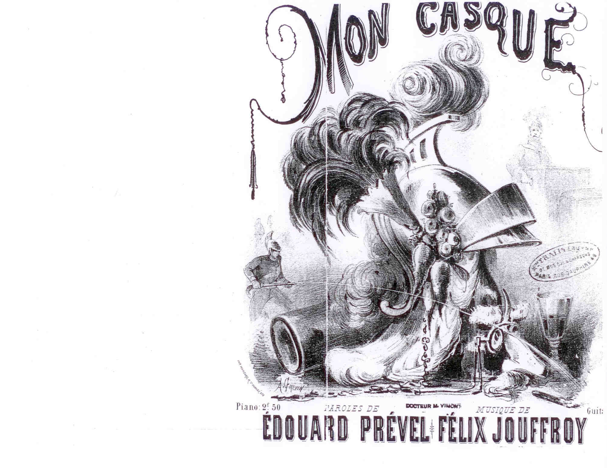 Partition